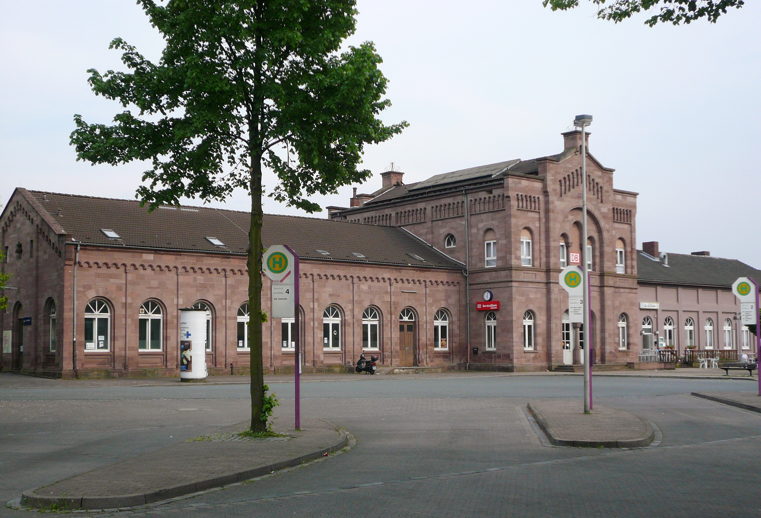 Bahnhofsgebäude in Holzminden, Niedersachsen